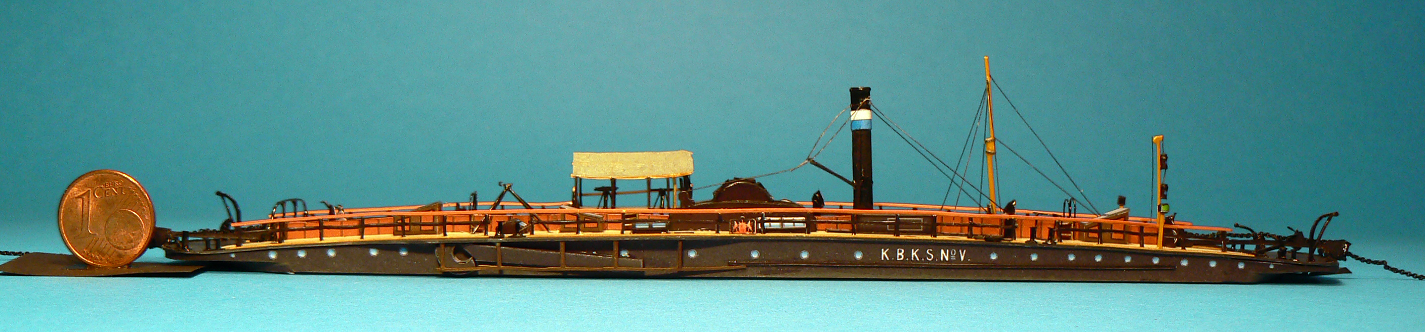 Kartonmodell des Kettenschlepper K.B.K.S. No. V im Maßstab 1:250